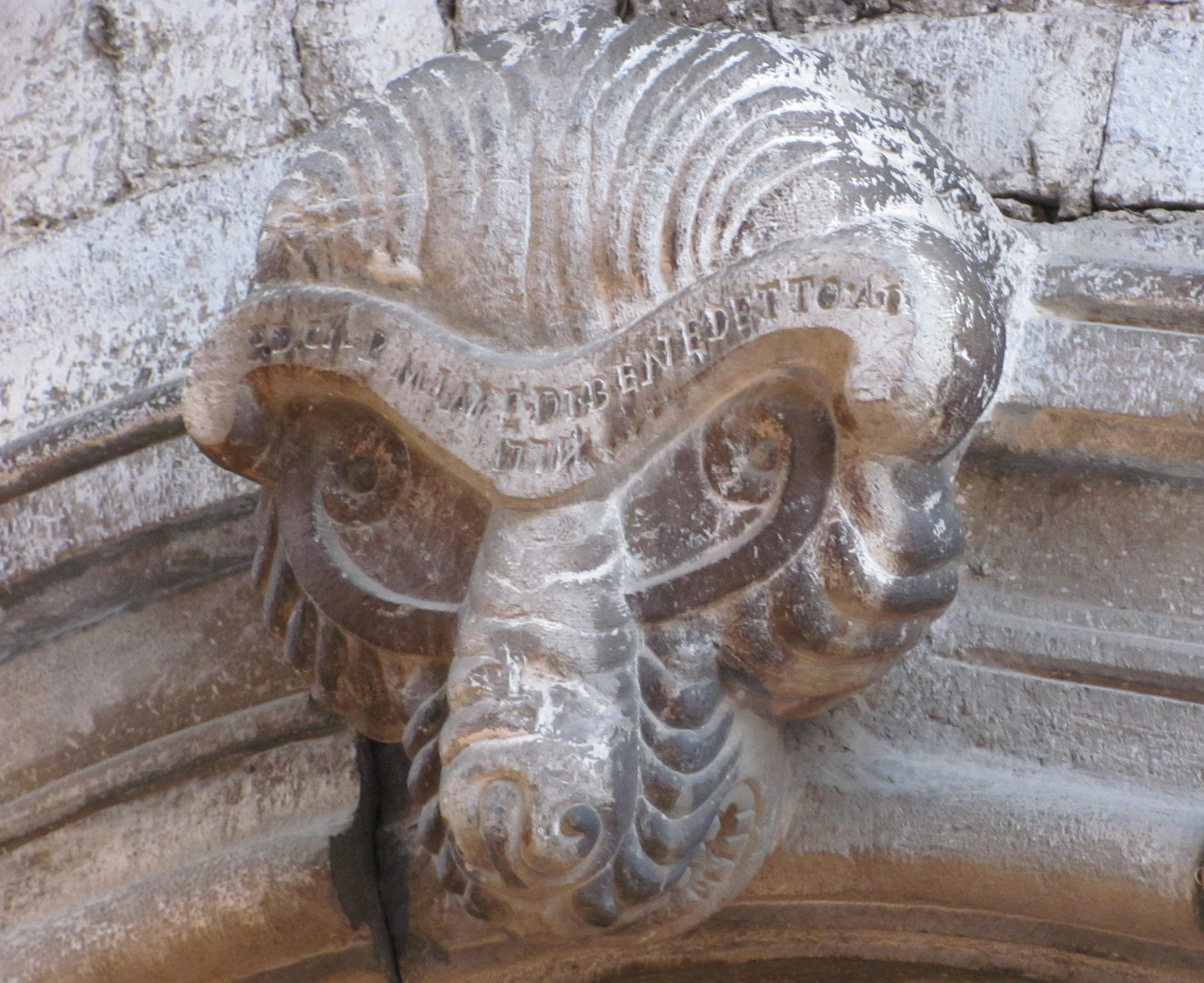 Portale Palazzo Di Benedetto dettaglio testa di ariete SIANO SA (dicembre 2010)